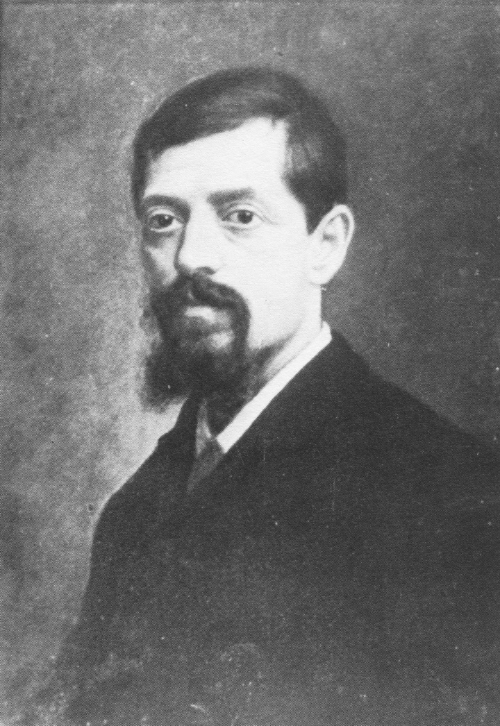 Autoritratto di Paolo Arri